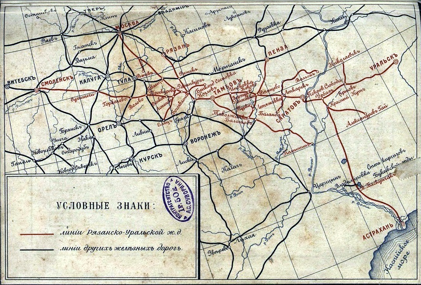 Россия. Карта Общества РУЖД(Ряз.-Уральской ж.-д.) на 1912г. Издание 1913г.